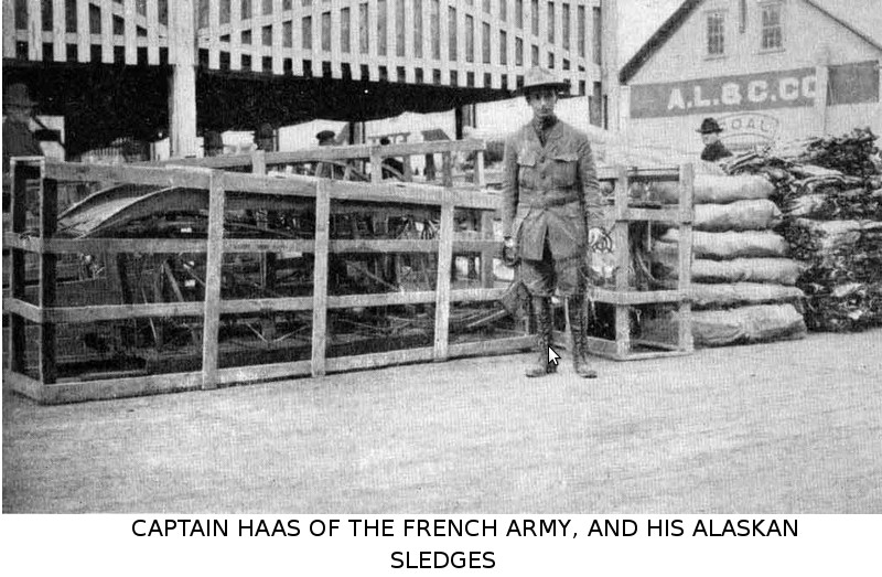 René HAAS, et les traîneaux en Alaska, dans le cadre de la création des Sections d'équipages de chiens d'Alaska.